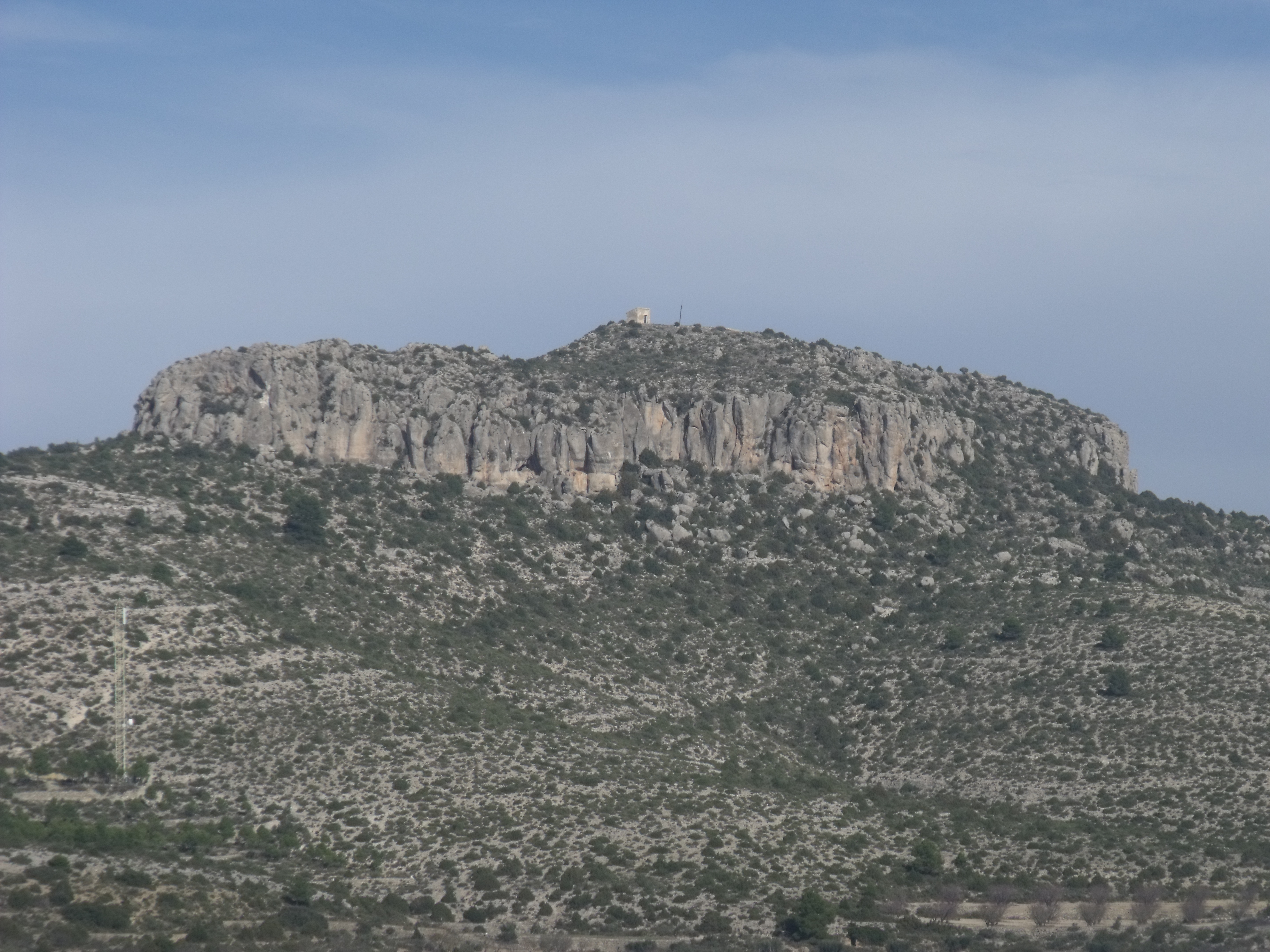 Vista de la montaña donde está el yacimiento de El Molón